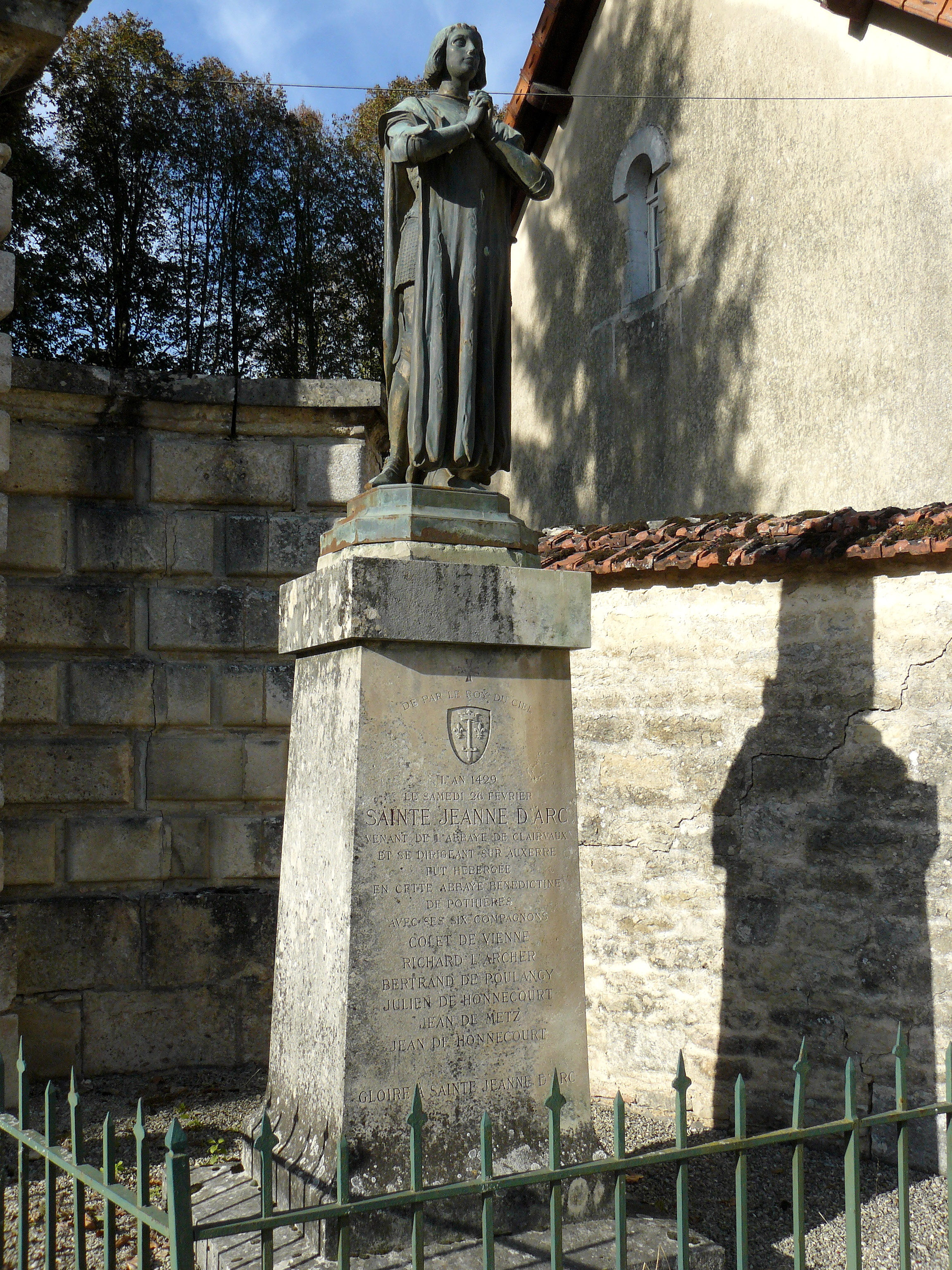 Statue en prière de Jeanne d'Arc à l'entrée de l'ancienne abbaye de Pothières (Côte-D'Or, France) avec le texte suivant : « L'an 1429, le samedi 26 février, Sainte Jeanne d'Arc, venant de l'abbaye de Clairvaux et se dirigeant sur Auxerre, fut hébergée en cette abbaye bénédictine de Pothières avec ses six compagnons, Colet de Vienne, Richard L'Archer, Bertrand de Poulangy, Julien de Honnecourt, Jean de Metz, Jean de Honnecourt. Gloire à Sainte Jeanne d'Arc. »